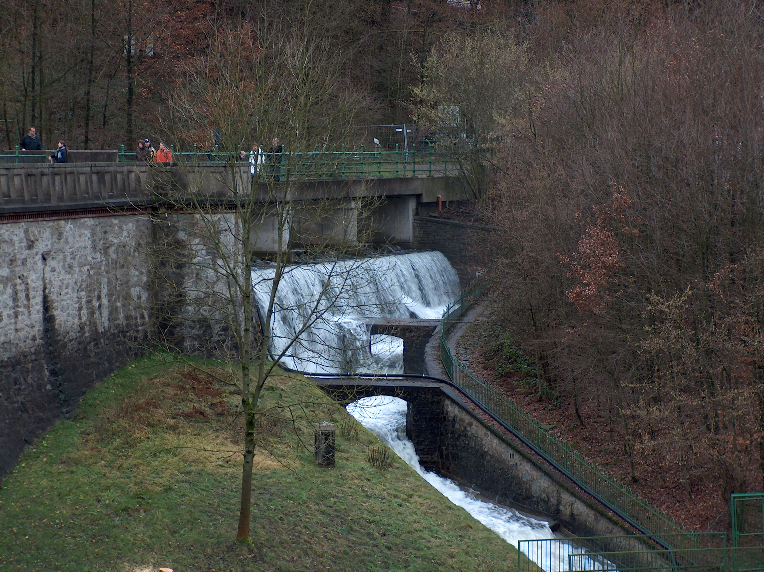 Heilenbecker Talsperre in Ennepetal, Ennepe-Ruhr-Kreis, Nordrhein-Westfalen